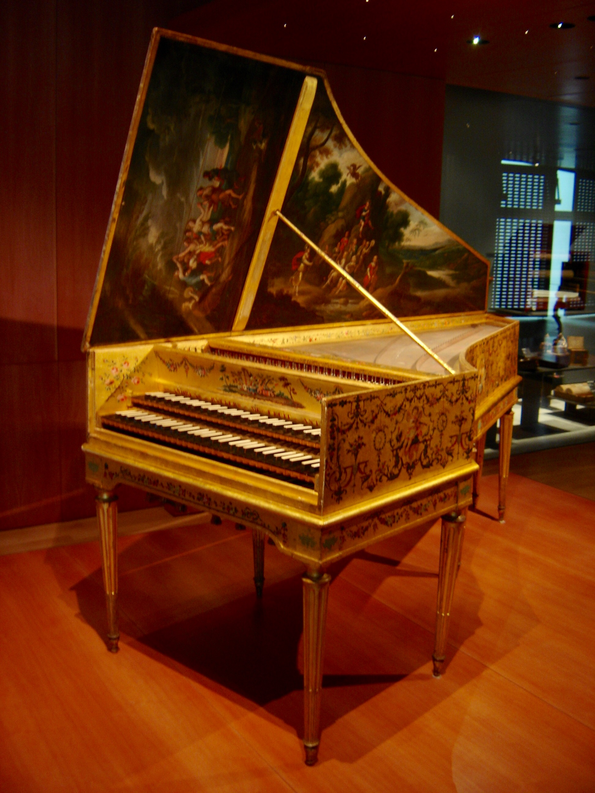 Clavecin par Andreas Ruckers (Anvers, 1646) ravalé par Pascal Taskin (Paris, 1780)